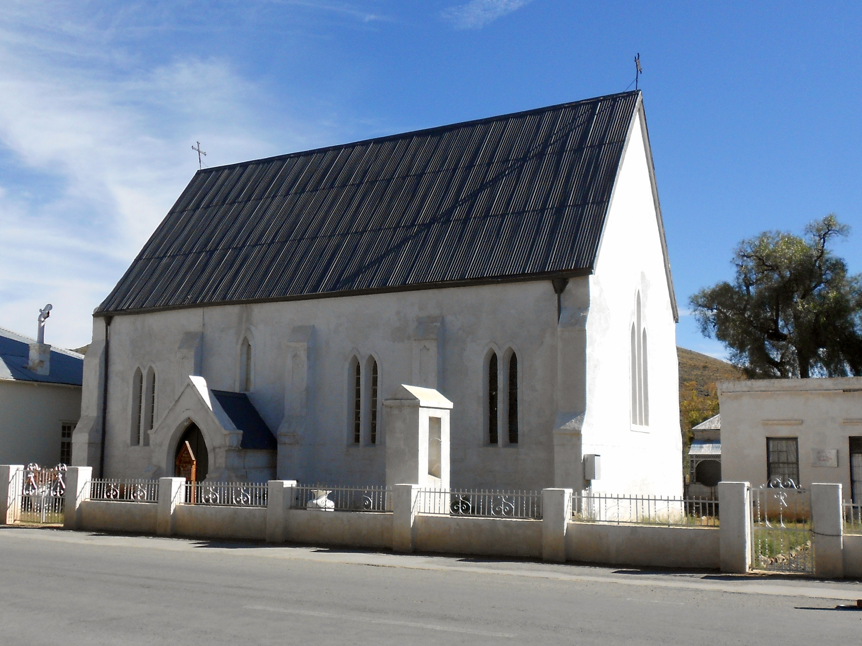 St John's Kerk, Victoria Wes 1869